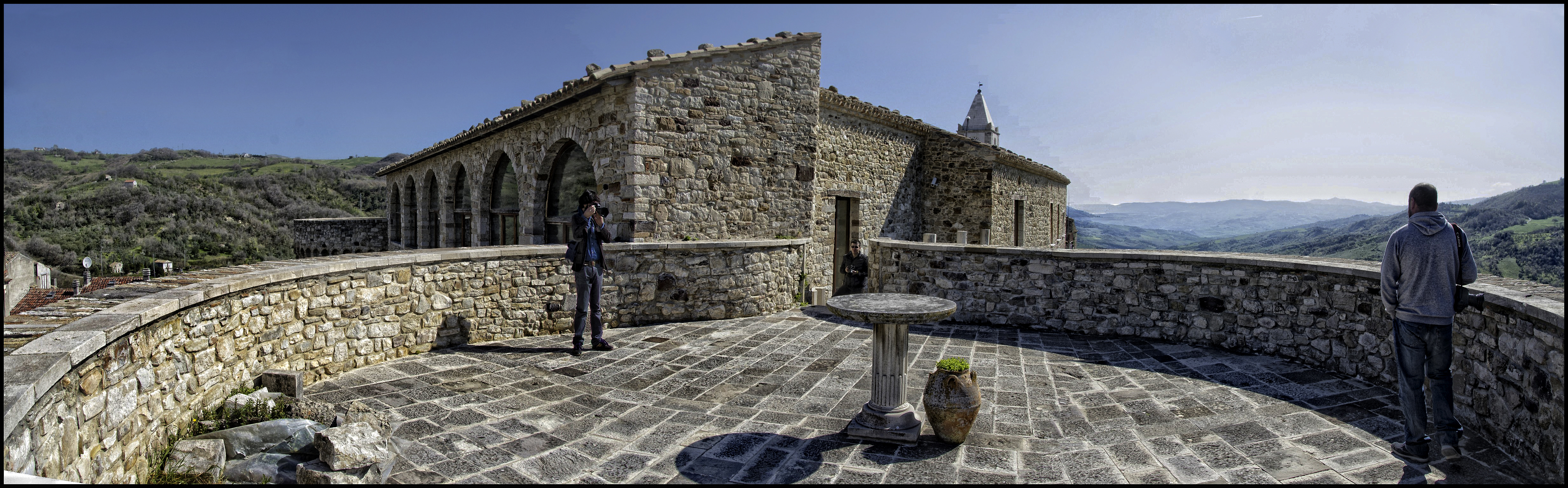 Castello - MIBAC This is a photo of a monument which is part of cultural heritage of Italy.